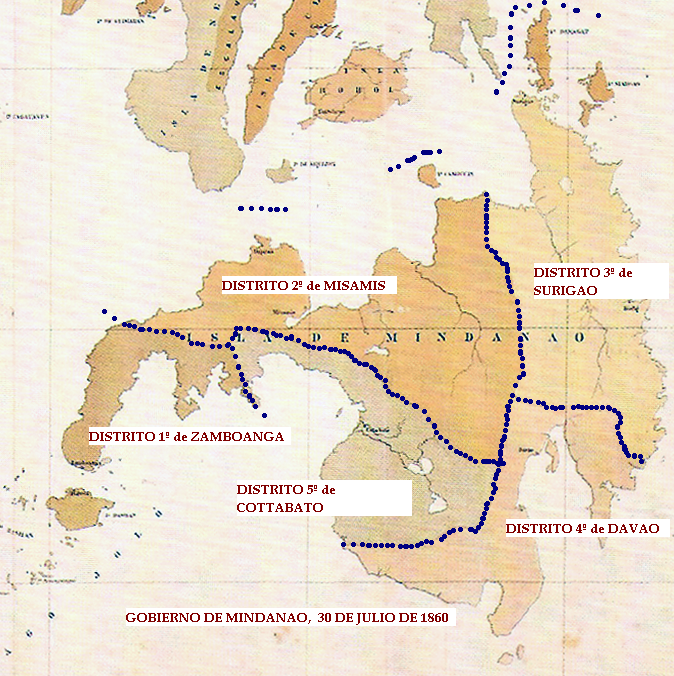 División territorial de la Isla de Mindanao en 5 Distritos. Año de 1880